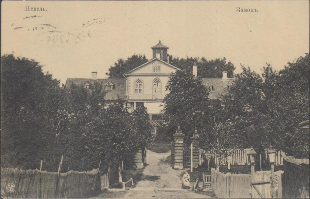 Беларуская (тарашкевіца): Невель (Nieviel). Замак